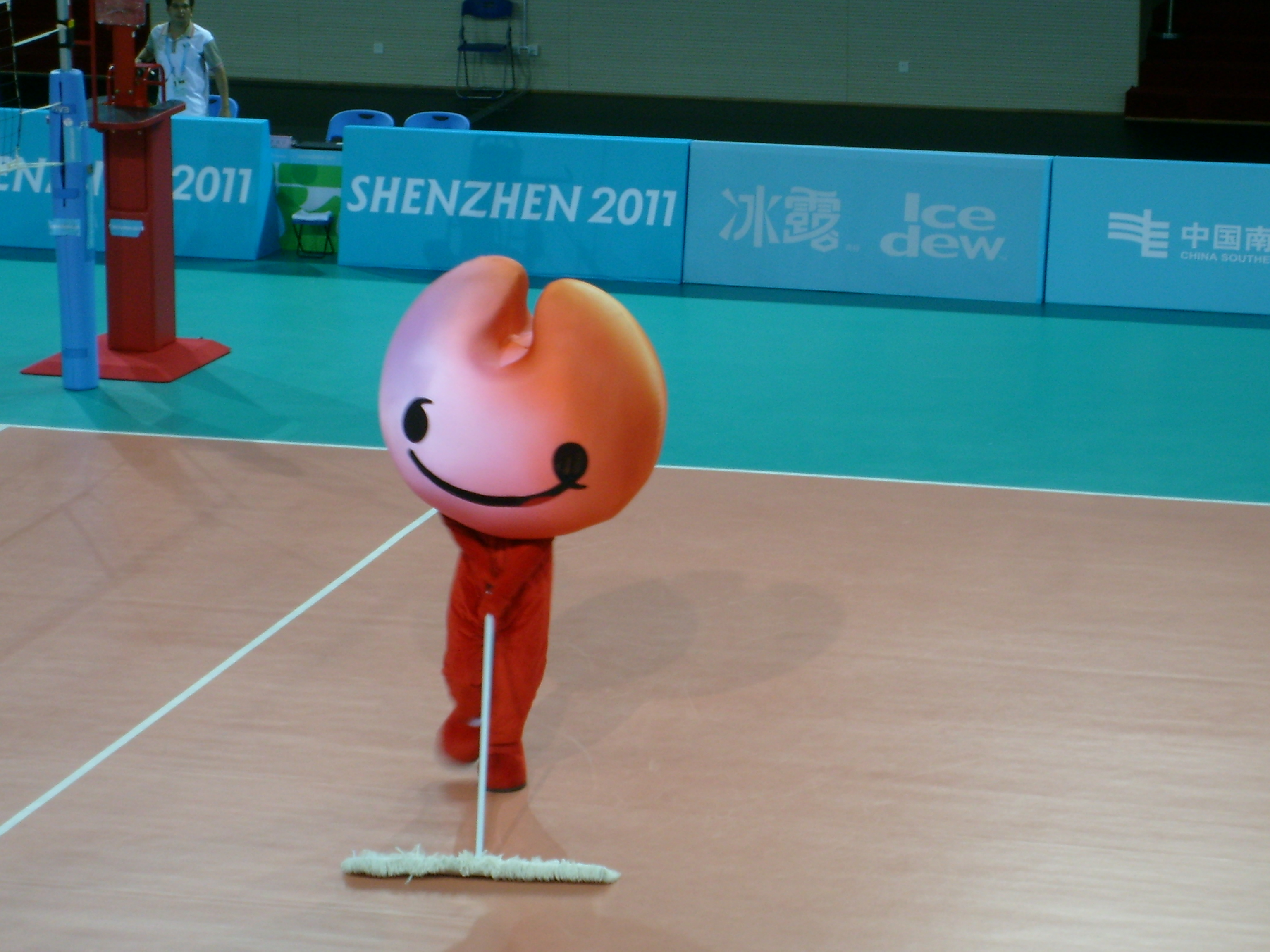 人体UU